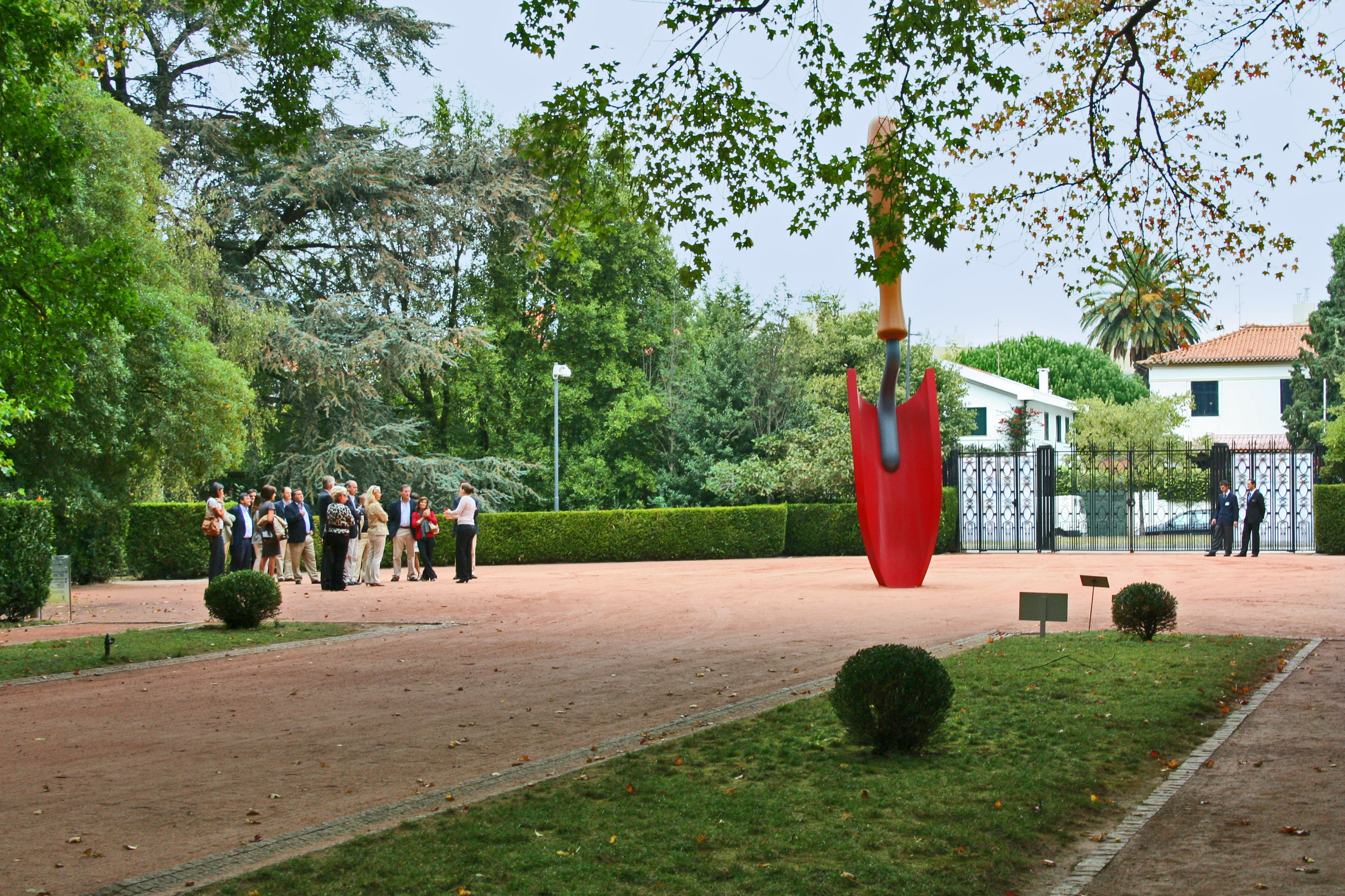 Parque de Serralves This file was uploaded for Wiki Loves Monuments in Portugal with the unique identifier 74212.